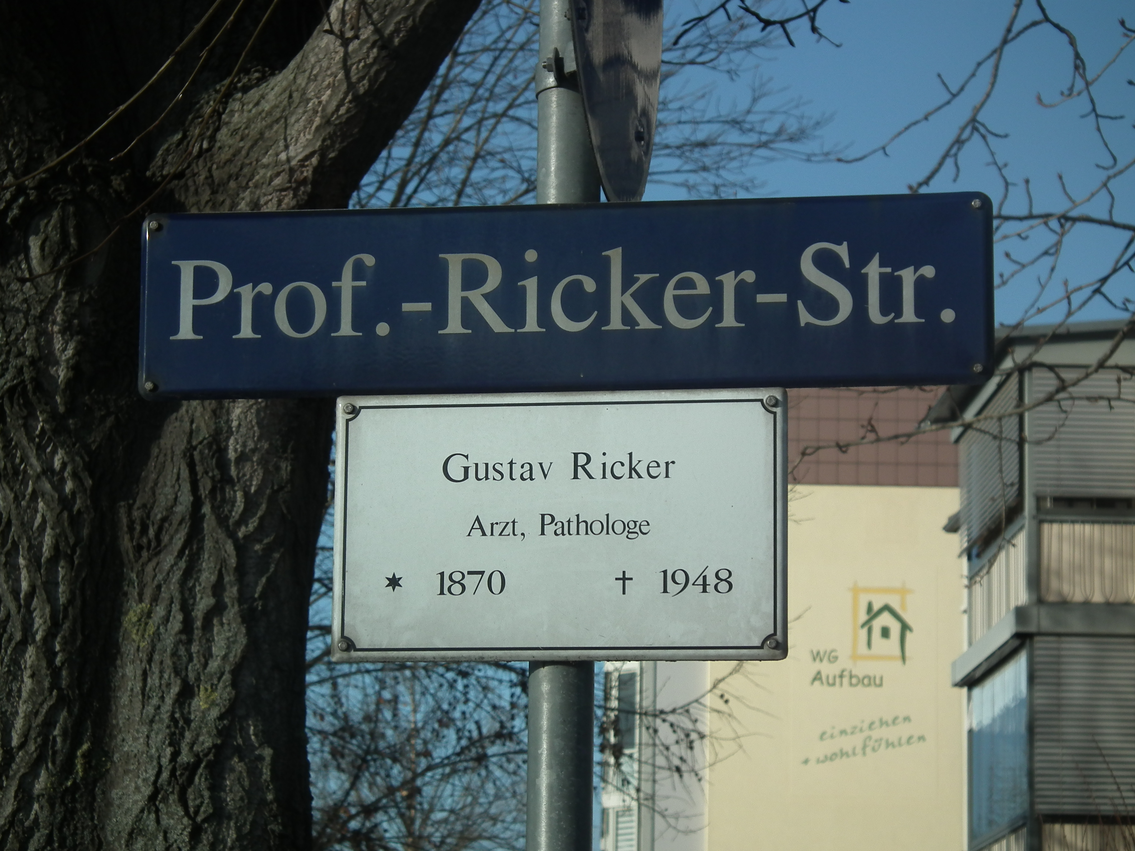 Spaziergang durch Tolkewitz, Laubegast, Seidnitz und Striesen